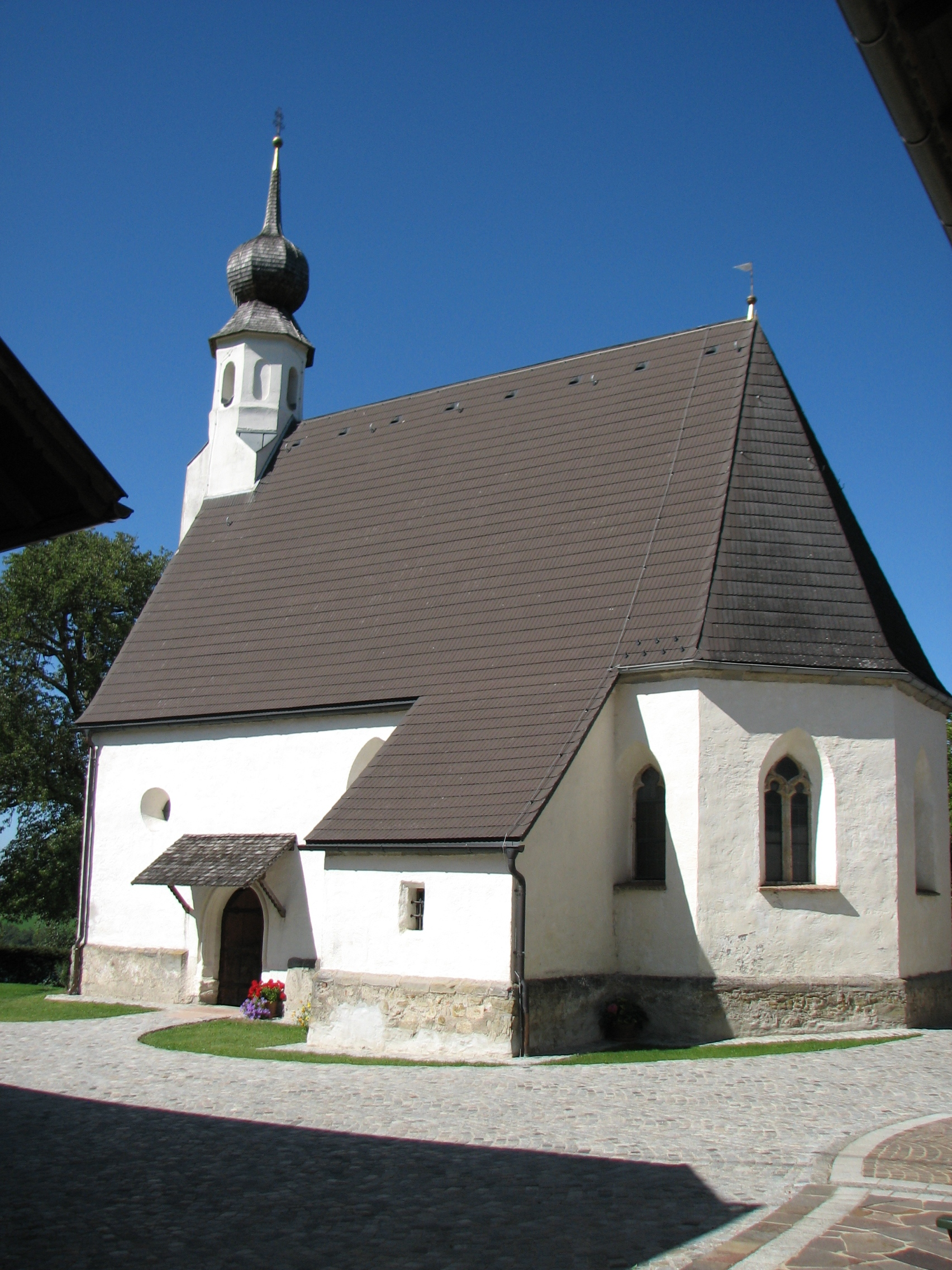 Kath. Filialkirche hl. Kreuz